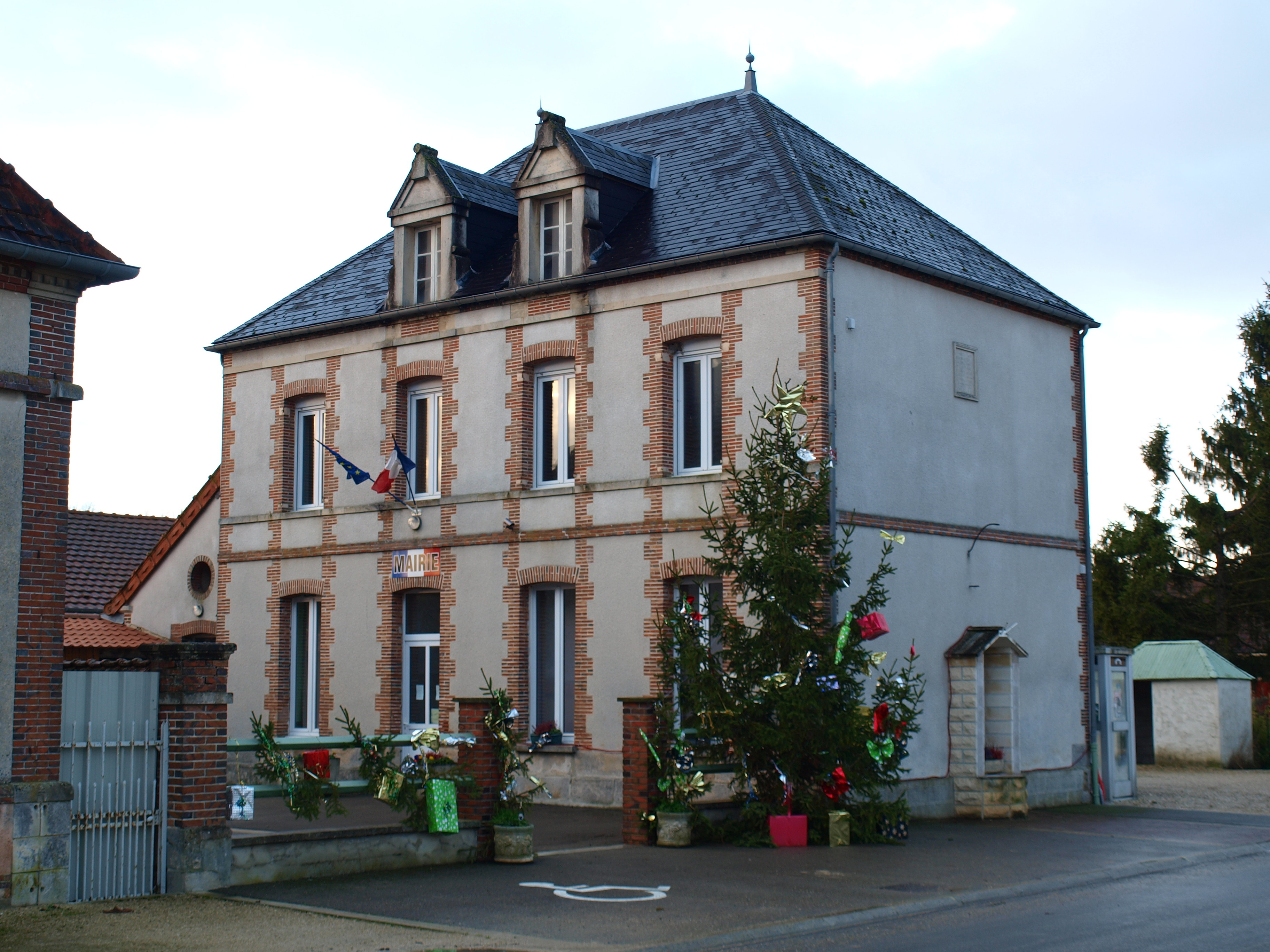 Linthes (Marne, France) ; mairie